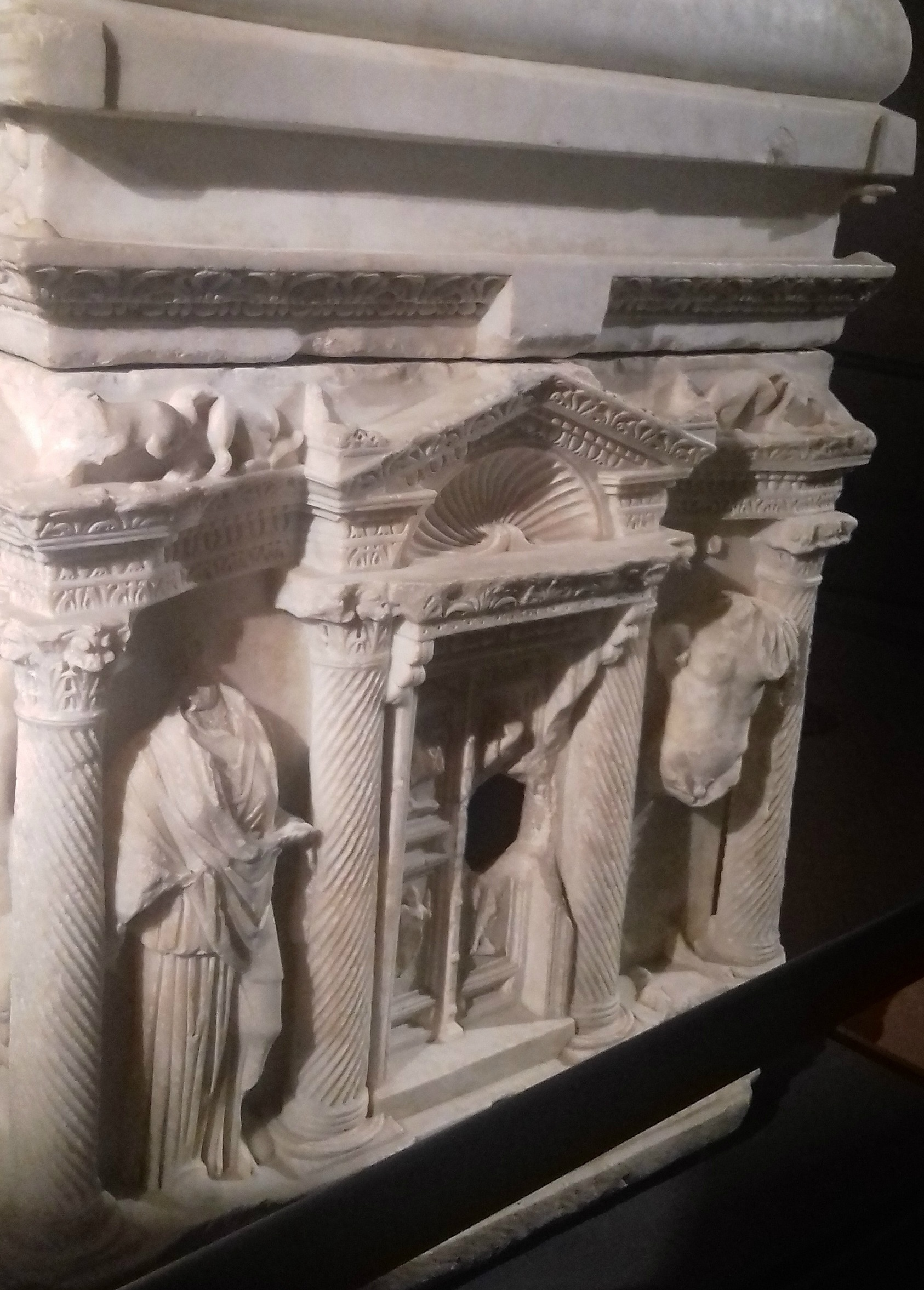 Sarcofago di Rapolla - lato destro